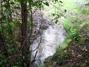 Huertas puquio